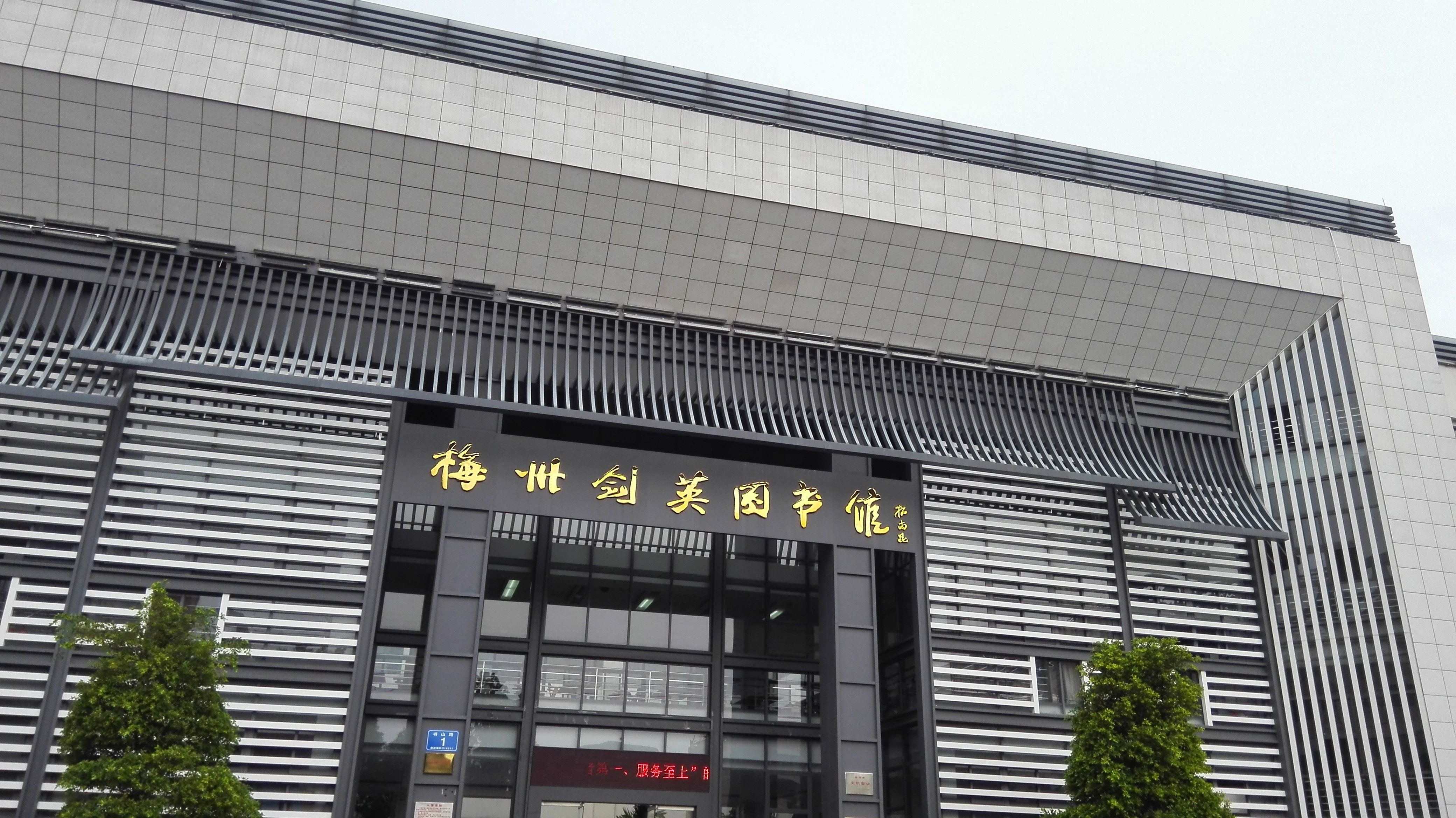 梅州剑英图书馆后面